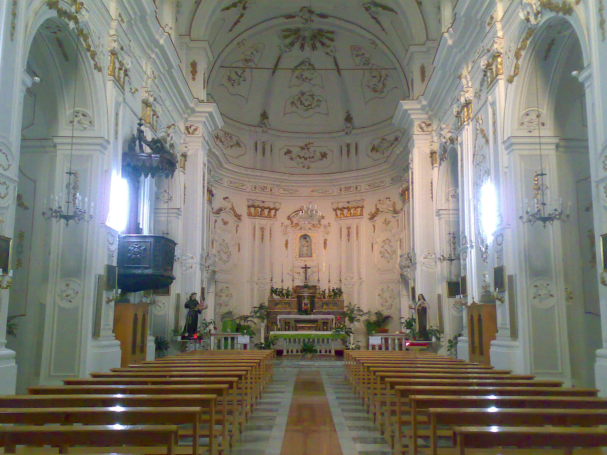 Interno della Chiesa "Mater Salvatoris"